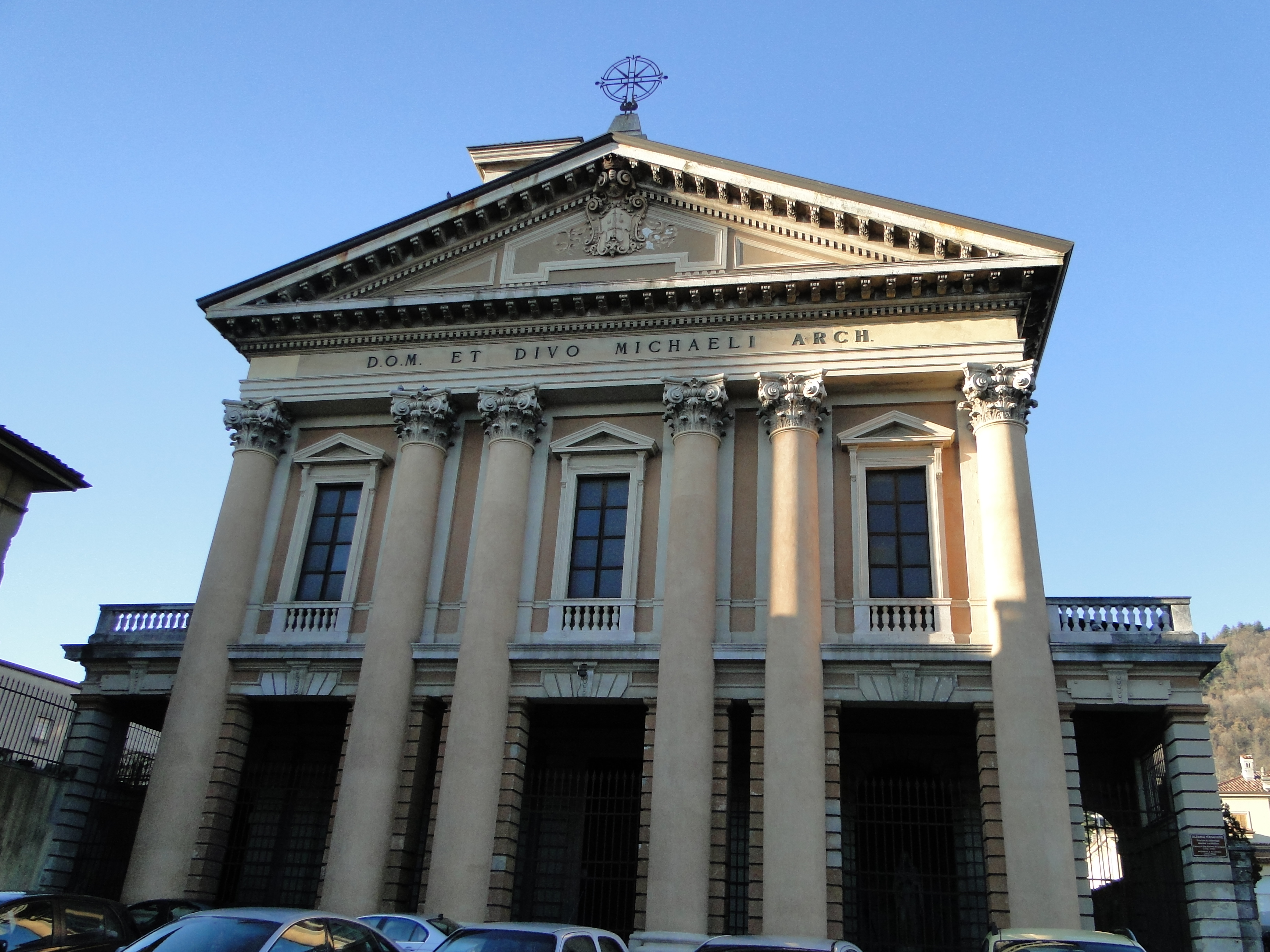 Alzano Lombardo (BG), Italy. Chiesa San Michele Arcangelo